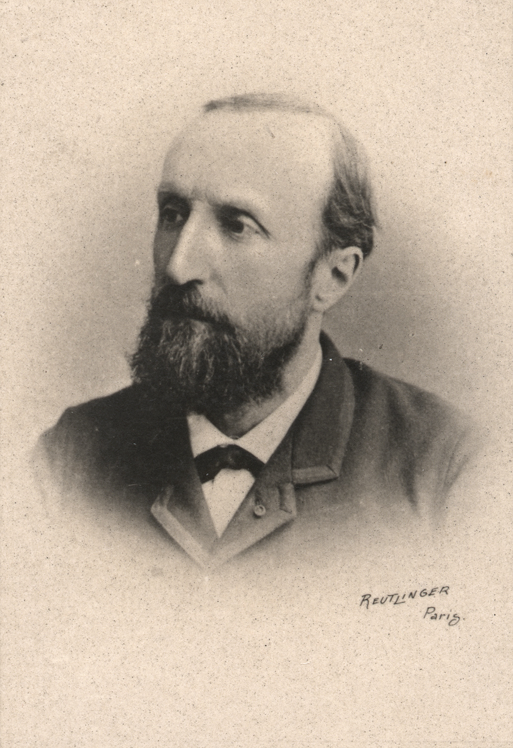 Portrait photographique de Jules Dalou par Reutlinger